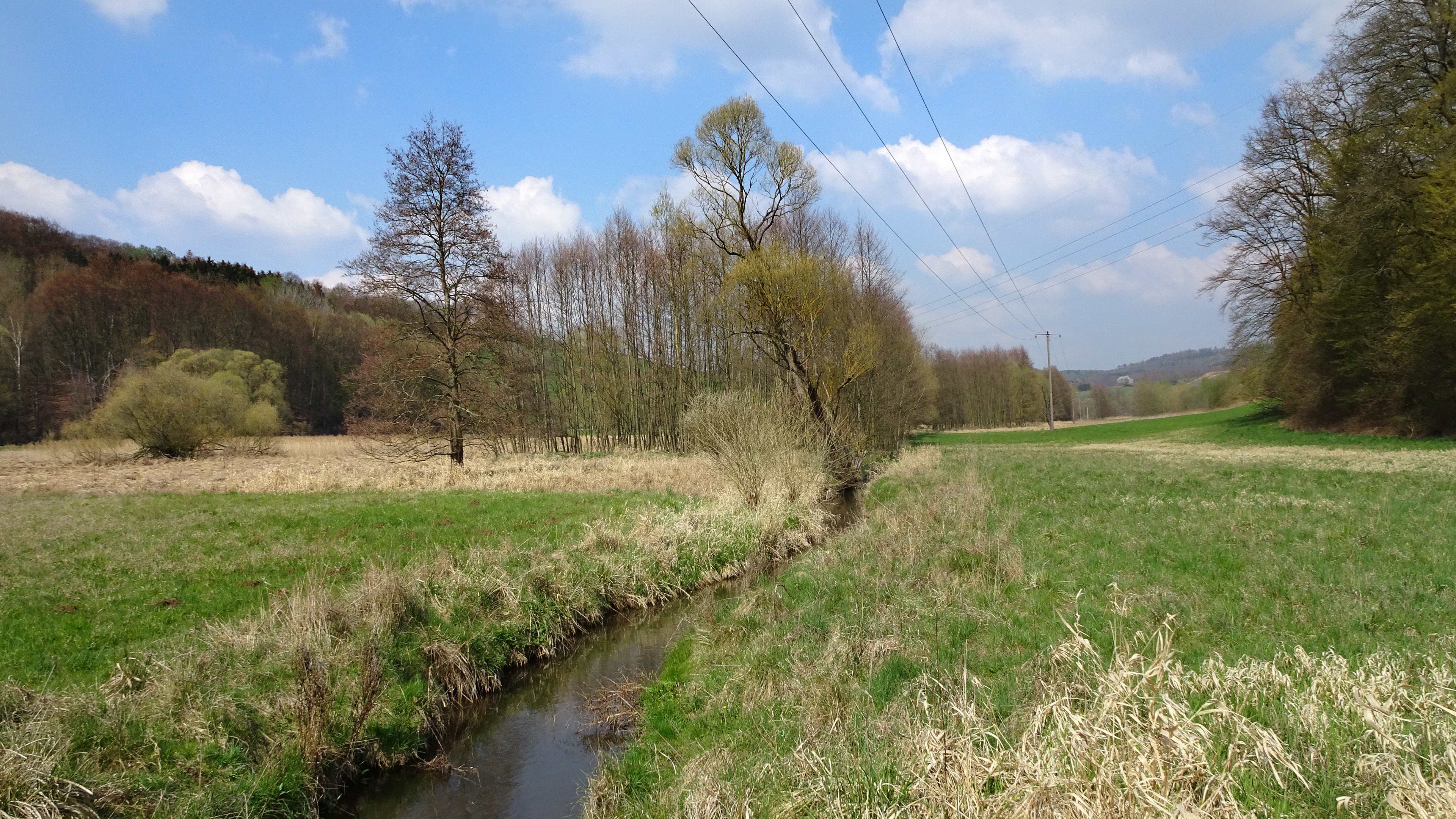 Der Haselgrund bei Schwarzenhasel ist ein Auenbereich zwischen den Ortsteilen Schwarzenhasel und Lispenhausen der Stadt Rotenburg an der Fulda im hessischen Landkreis Hersfeld-Rotenburg. Die feuchten Wiesen sowie die Schilfröhrichte und Seggenriede im Haselgrund bieten seltenen Pflanzen- und Tierarten Lebensraum. Um das Gebiet zu schützen und durch Extensivierung und Renaturierung zu verbessern, wurde es im Dezember 1991 Naturschutzgebiet ausgewiesen.